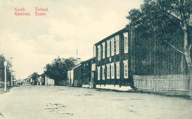 Kaskö stad vid sekelskiftet 1900, ett äldre vykort i Harri Blombergs ägo. All information om kortets ursprung med fotograf m m saknas, nämns ej på kortet.